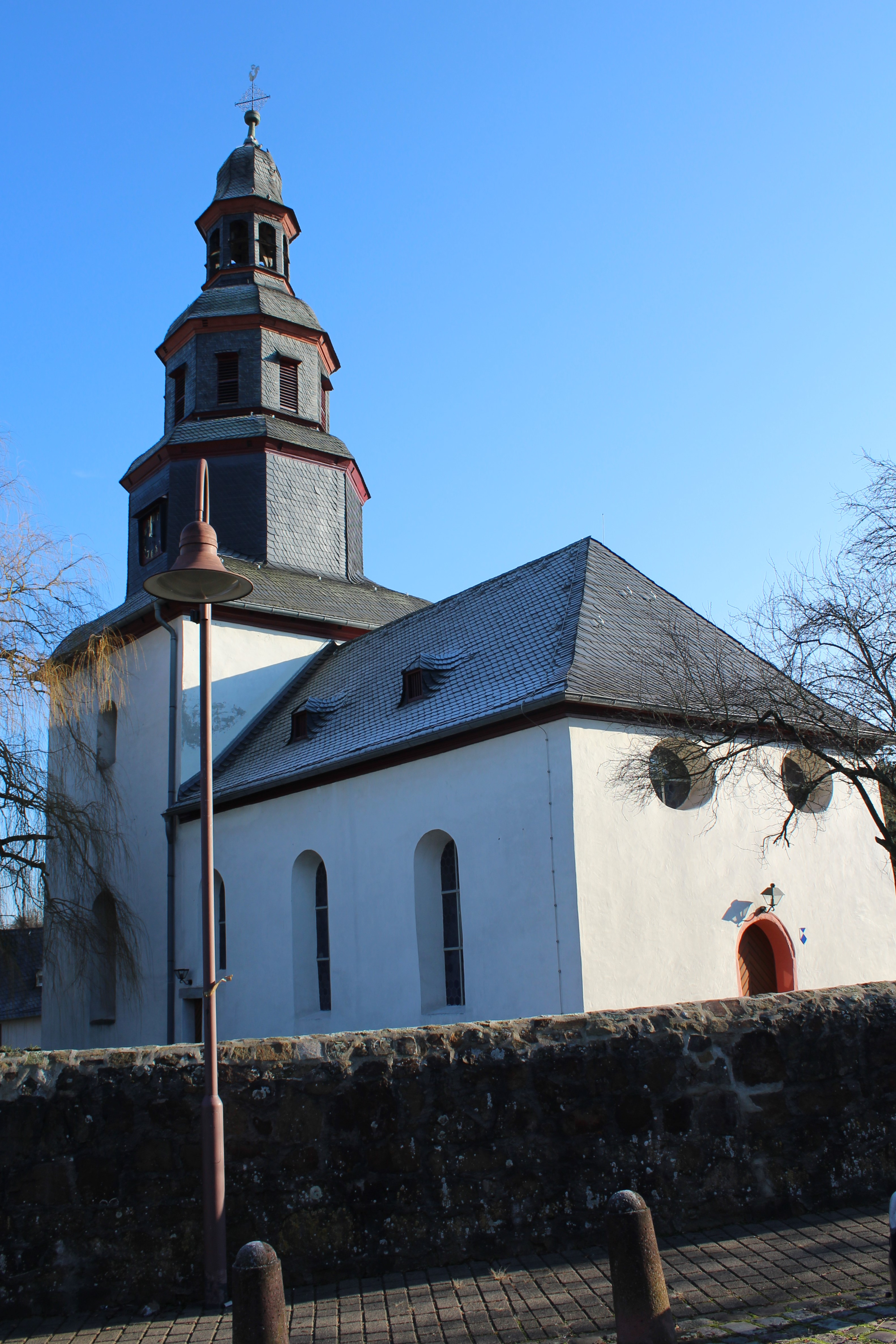 Evangelische Kirche Steindorf, Wetzlar, Lahn-Dill-Kreis, Hessen, Deutschland